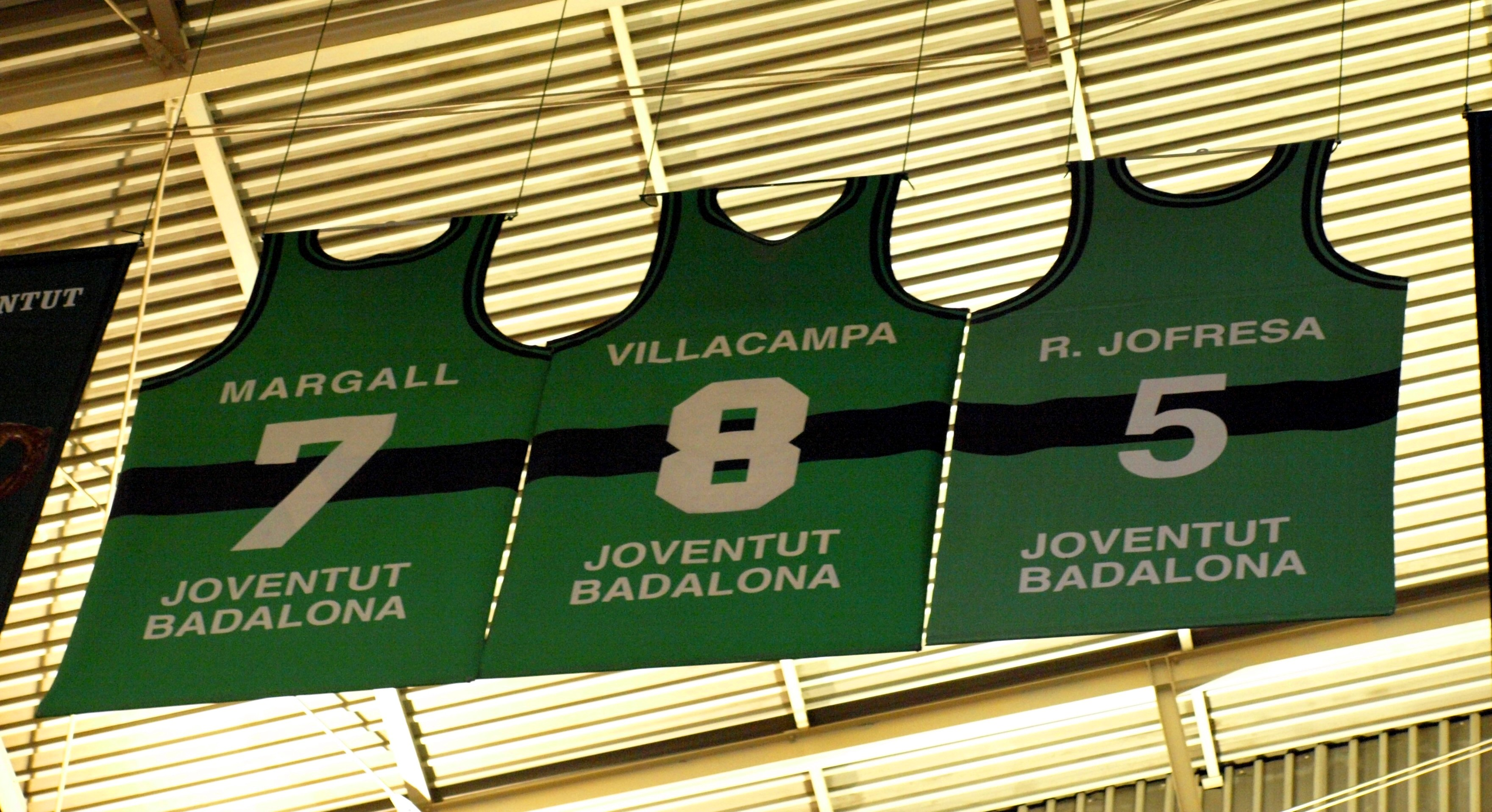 Camisetas retiradas del Joventut de Badalalona de JM Margall (7), Jordi Villacampa (8) y Rafael Jofresa (5) en el Pabellón Olímpico de Badalona